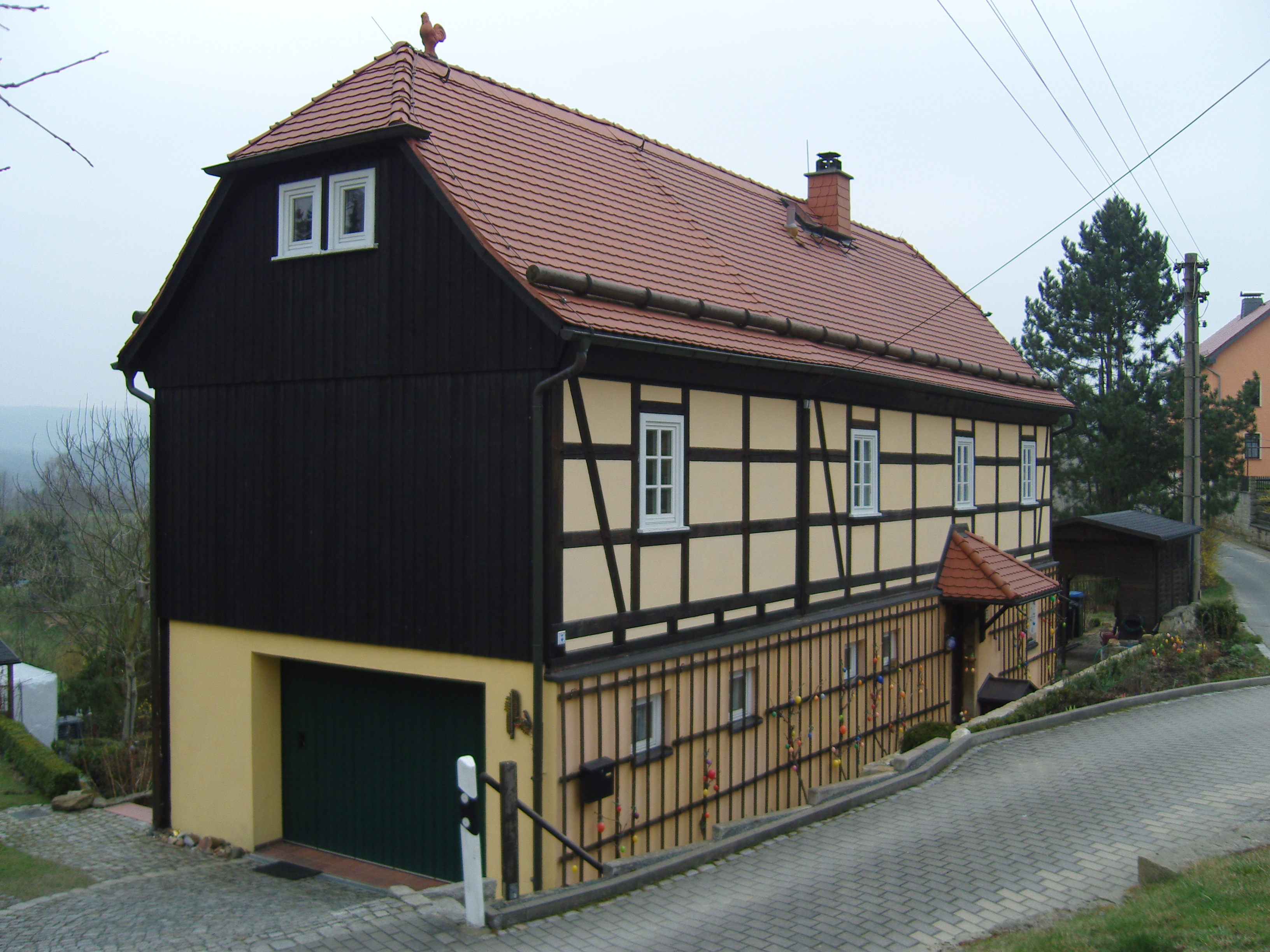 Fachwerkhaus in Weißig (Struppen) Nr. 12